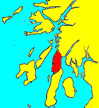 Localisation de Knapdale au sein d'Argyll and Bute